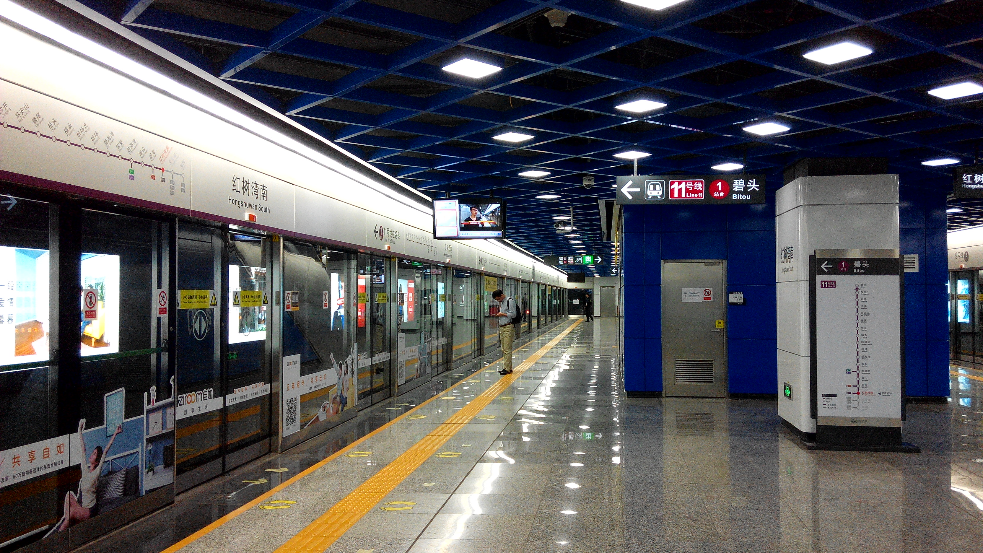 深圳地铁11号线 红树湾站1号站台